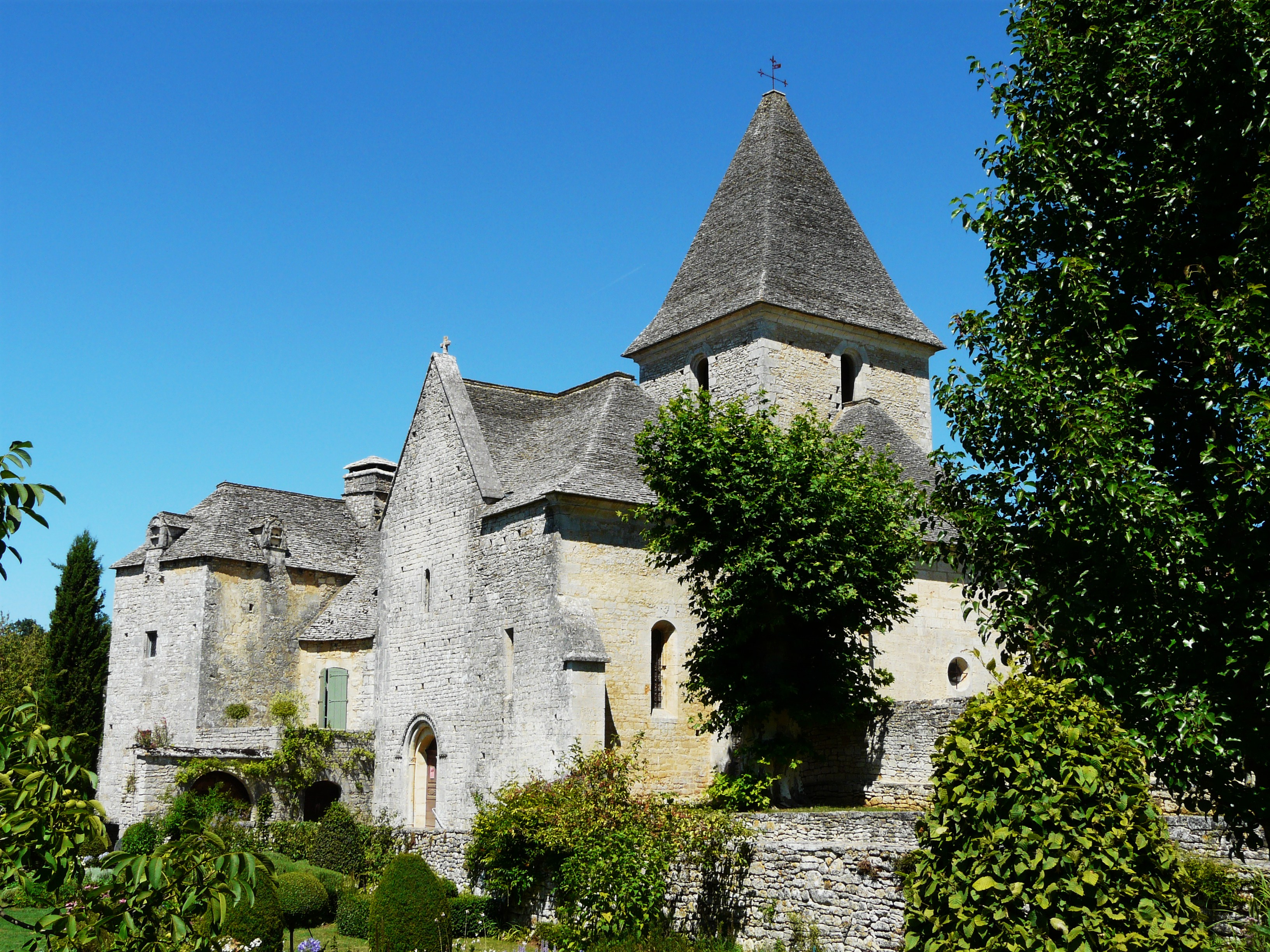 L'église Saint-Barthélemy, flanquée à gauche du presbytère, La Cassagne, Dordogne, France